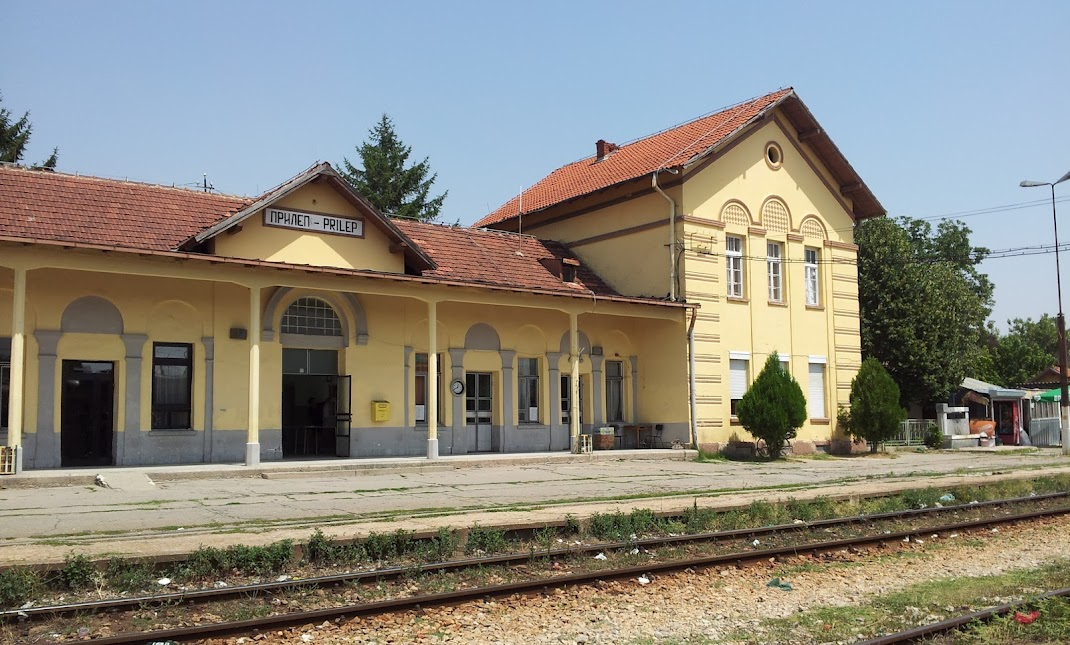 Железничка станица - Прилеп